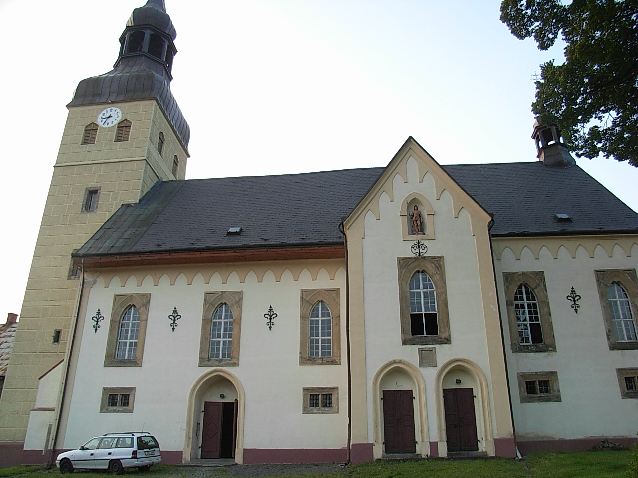 Chřibská, kostel sv. Jiří